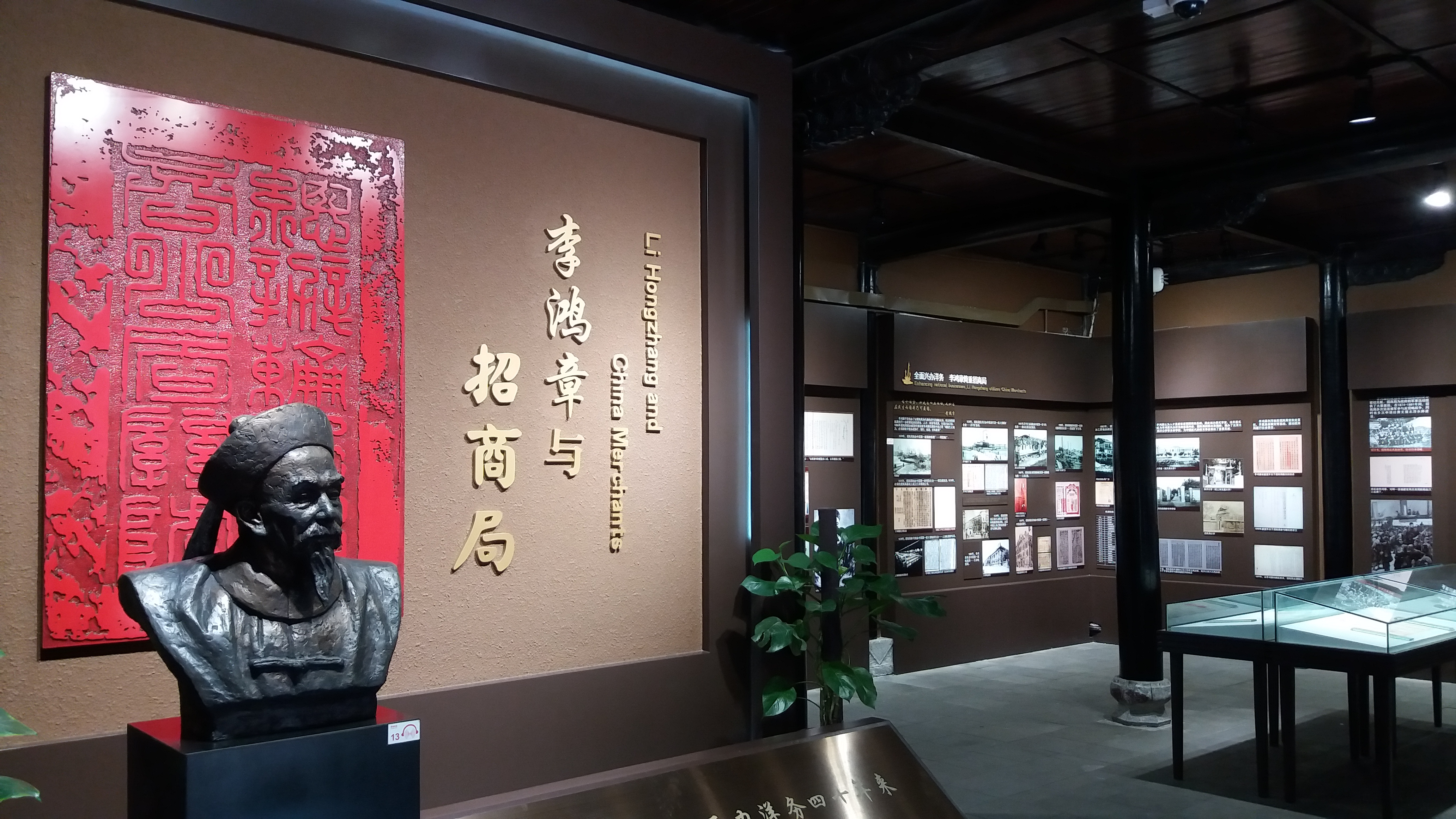 Former Residence of Li Hongzhang